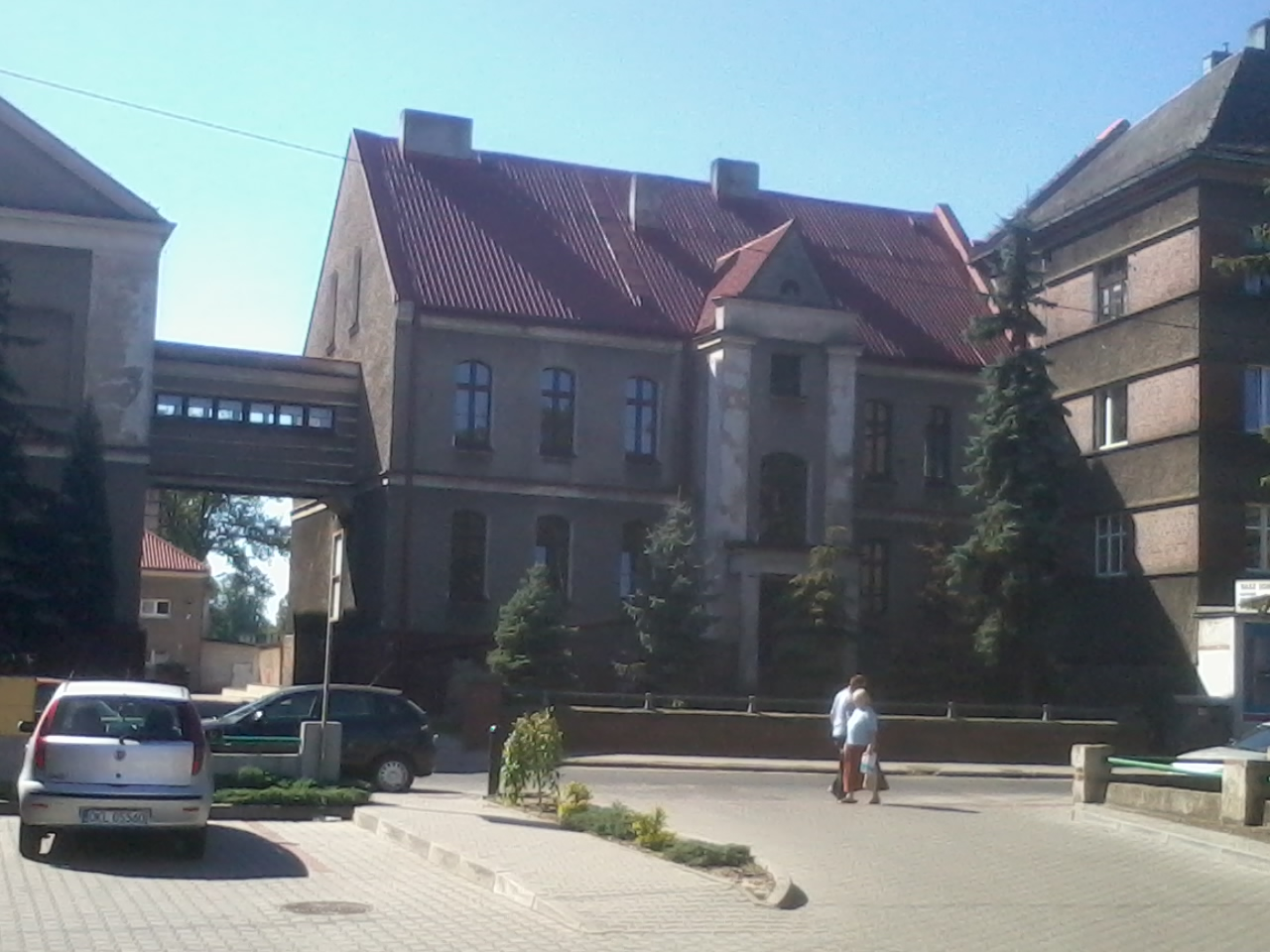 Kluczbork, budynek szkolny (zachodni) z łącznikiem, 1865-1870, 1925-1926, ul. Mickiewicza 10